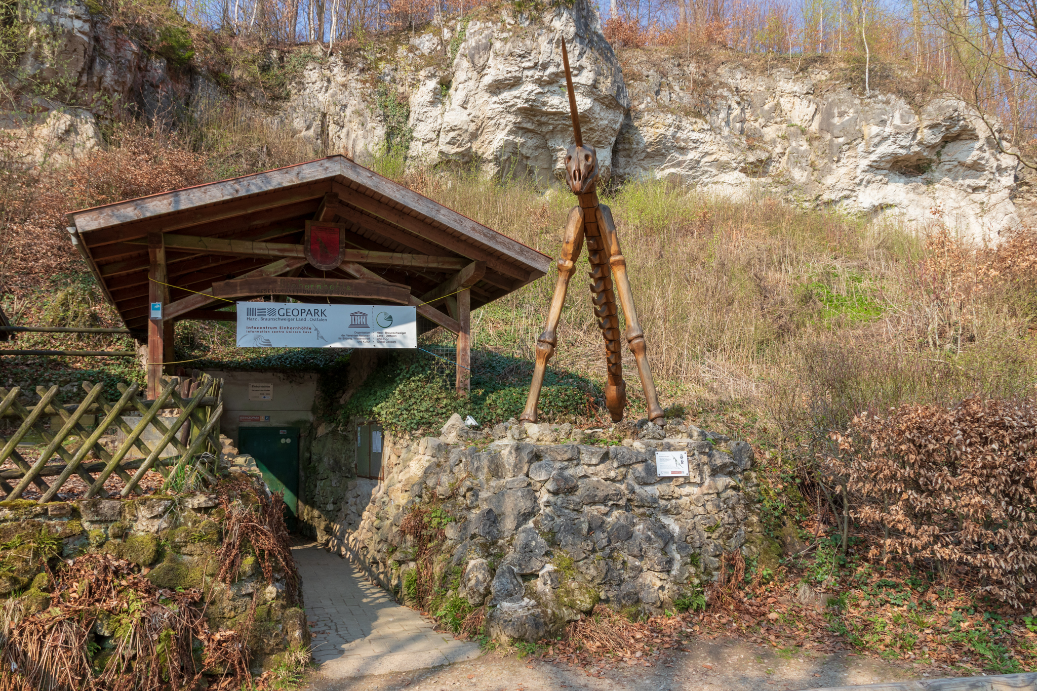 Eingang zur Einhornhöhle im Nationalpark Harz